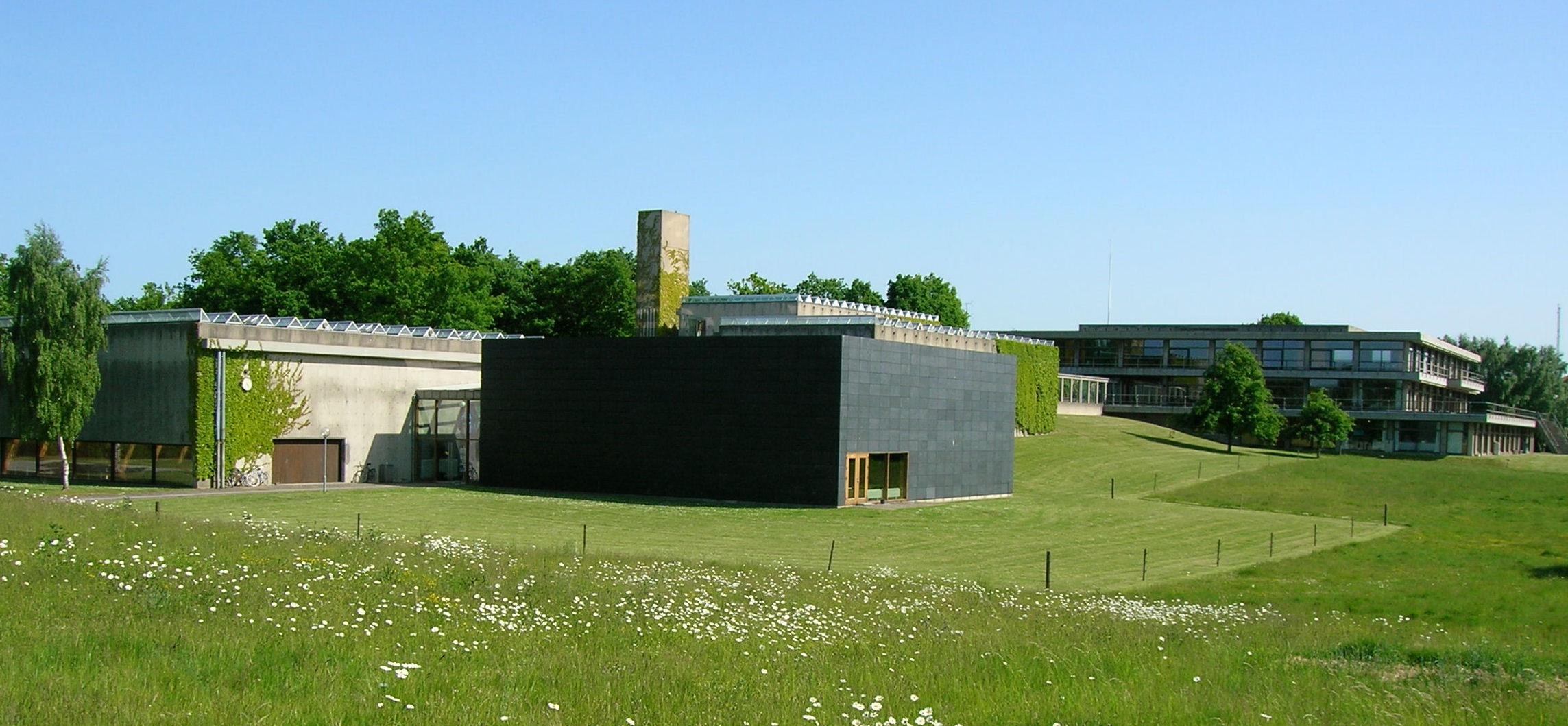 Holbæk Seminarium